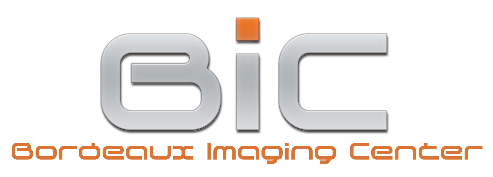 Logo du Bordeaux Imaging Center